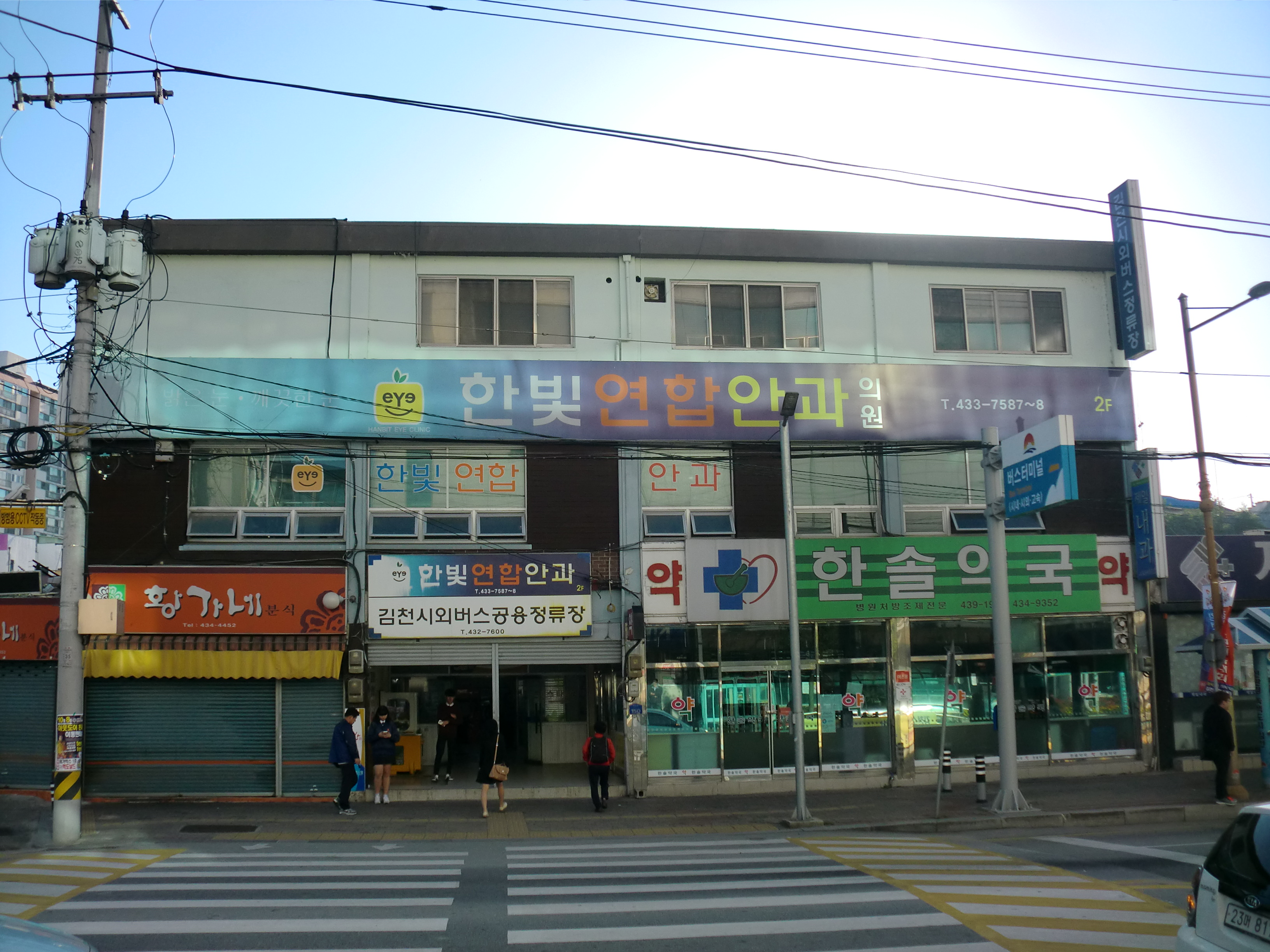 경상북도 김천시에 있는 김천공용버스터미널